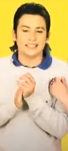 Liss Pereira y Sebastián Vega se conectarán con los televidentes en 361º para innovar, el nuevo magazín que nace gracias a la alianza entre Canal TR3CE, el Ministerio de las Tecnologías de la Información y las Comunicaciones - TIC y el Sena, que busca enriquecer los conocimientos de los jóvenes en las nuevas tecnologías de la era digital.